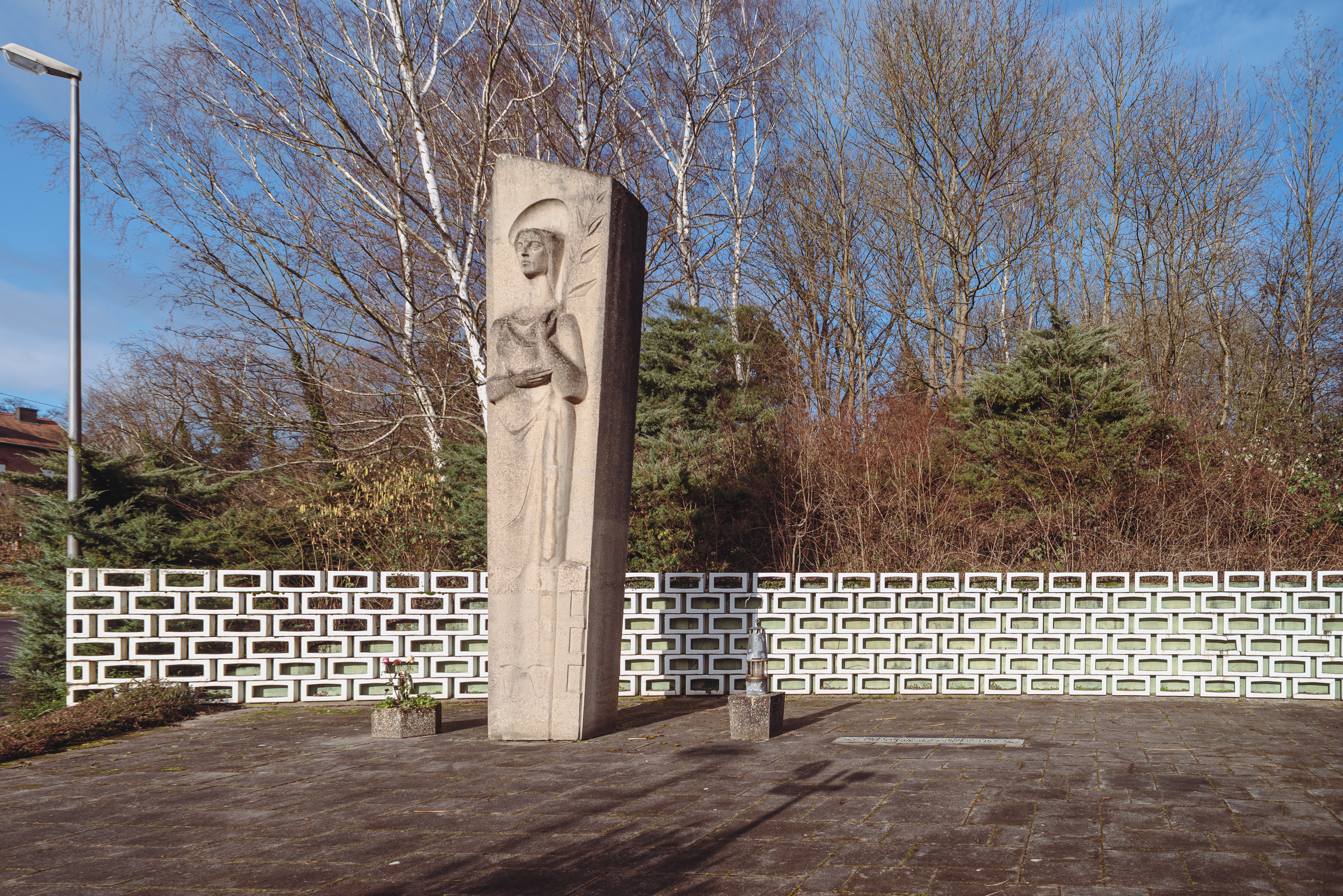 Das Denkmal für das Grubenunglück von Luisenthal auf dem Platz des 7. Februar 1962